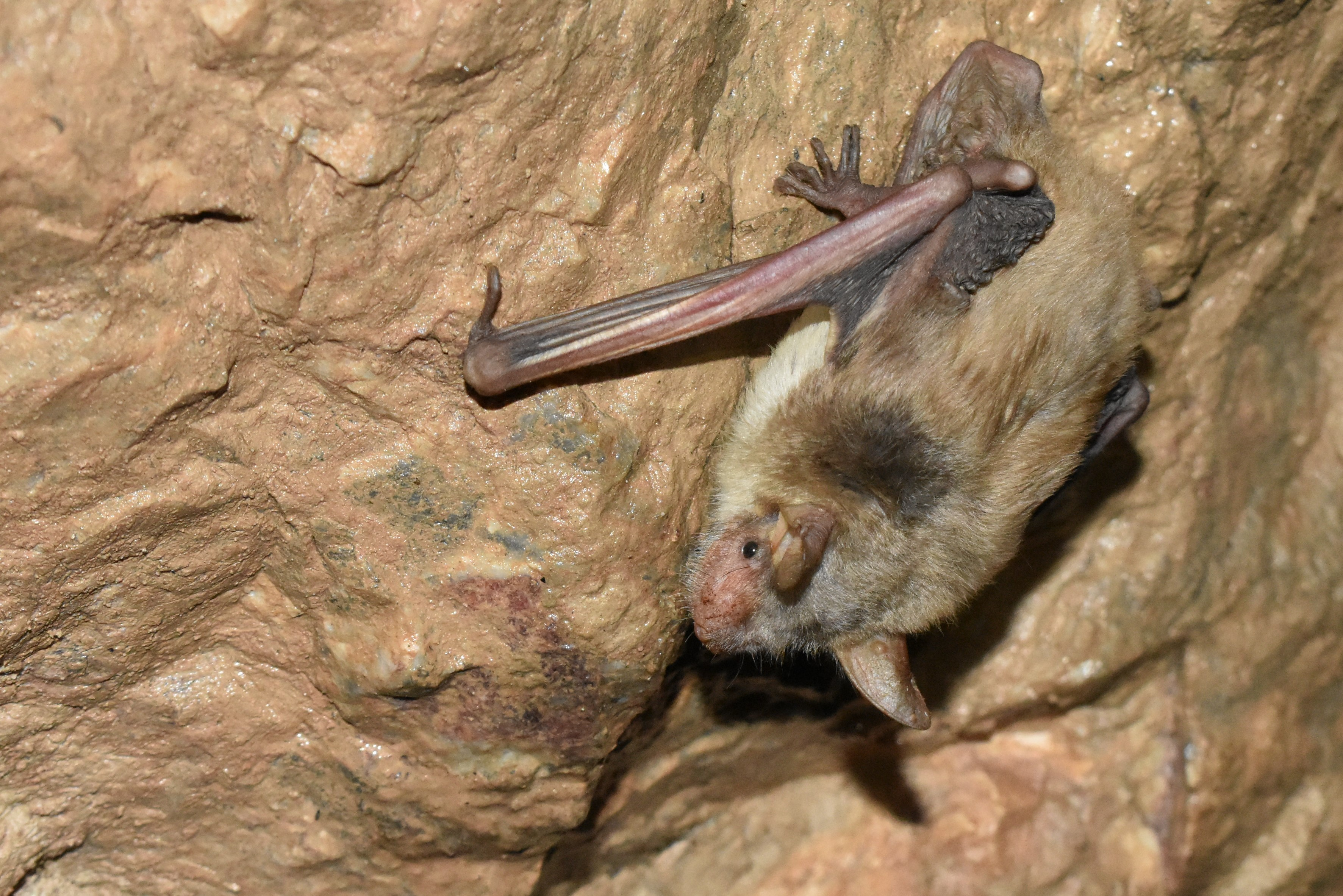 Остроухая ночница